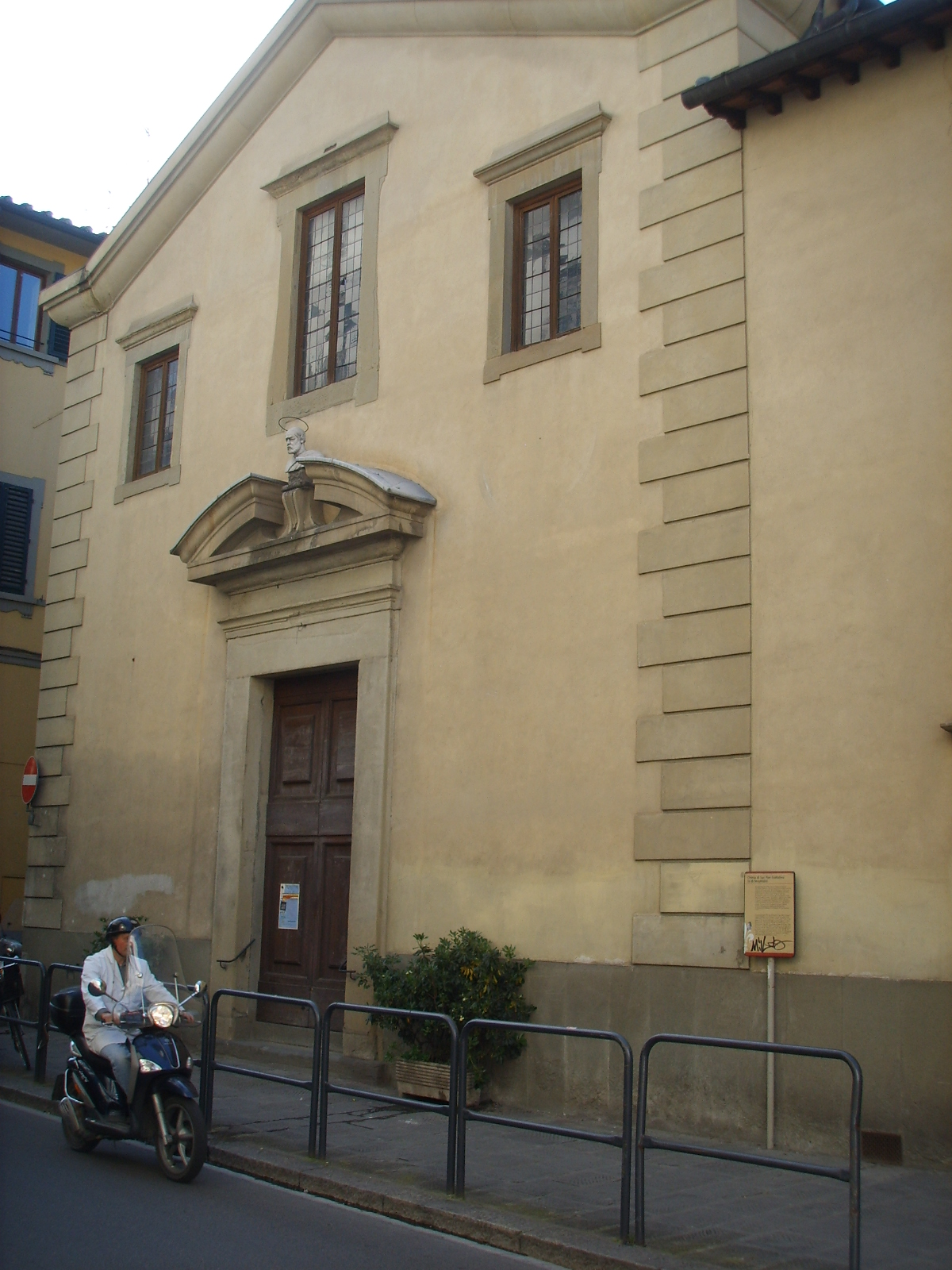 San pier gattolino